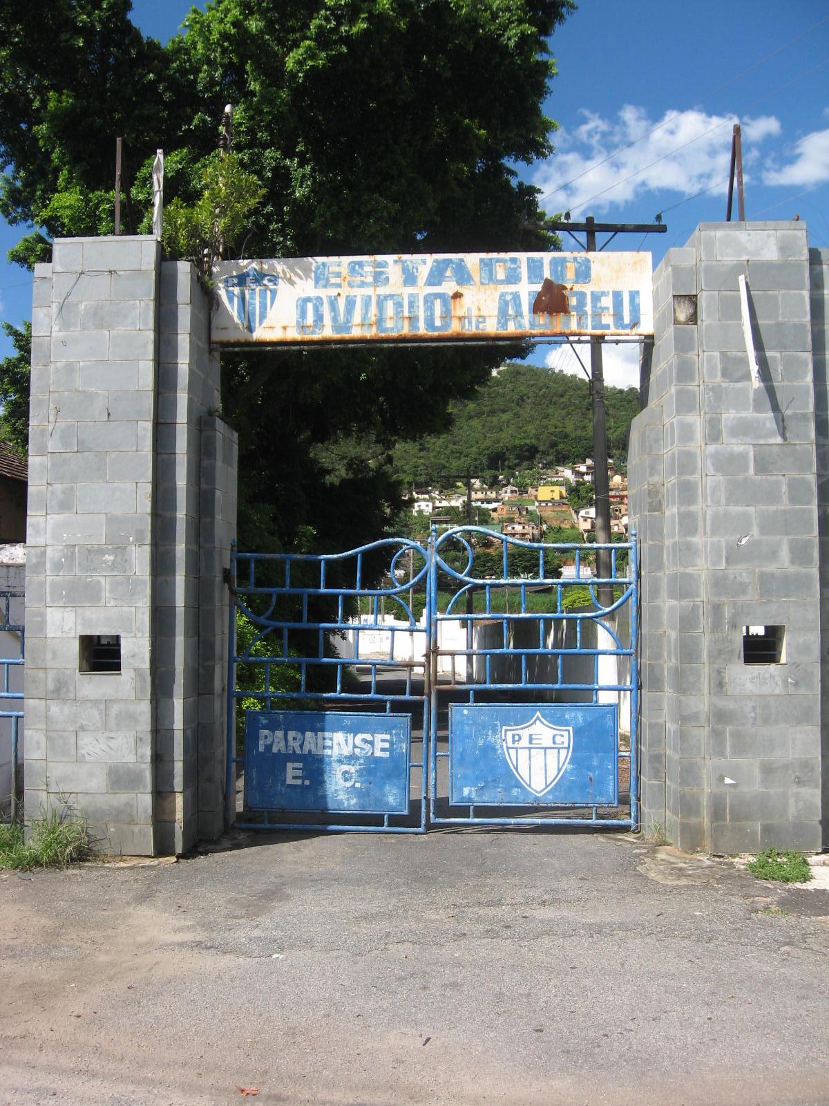 Entrada do estádio Ovídio de Abreu, em Pará de Minas, Minas Gerais, Brasil.